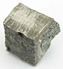 Bildbeschreibung: Dysprosium Quelle: Foto aus meiner Elementesammlung Fotograf: Tomihahndorf Datum: April 2006